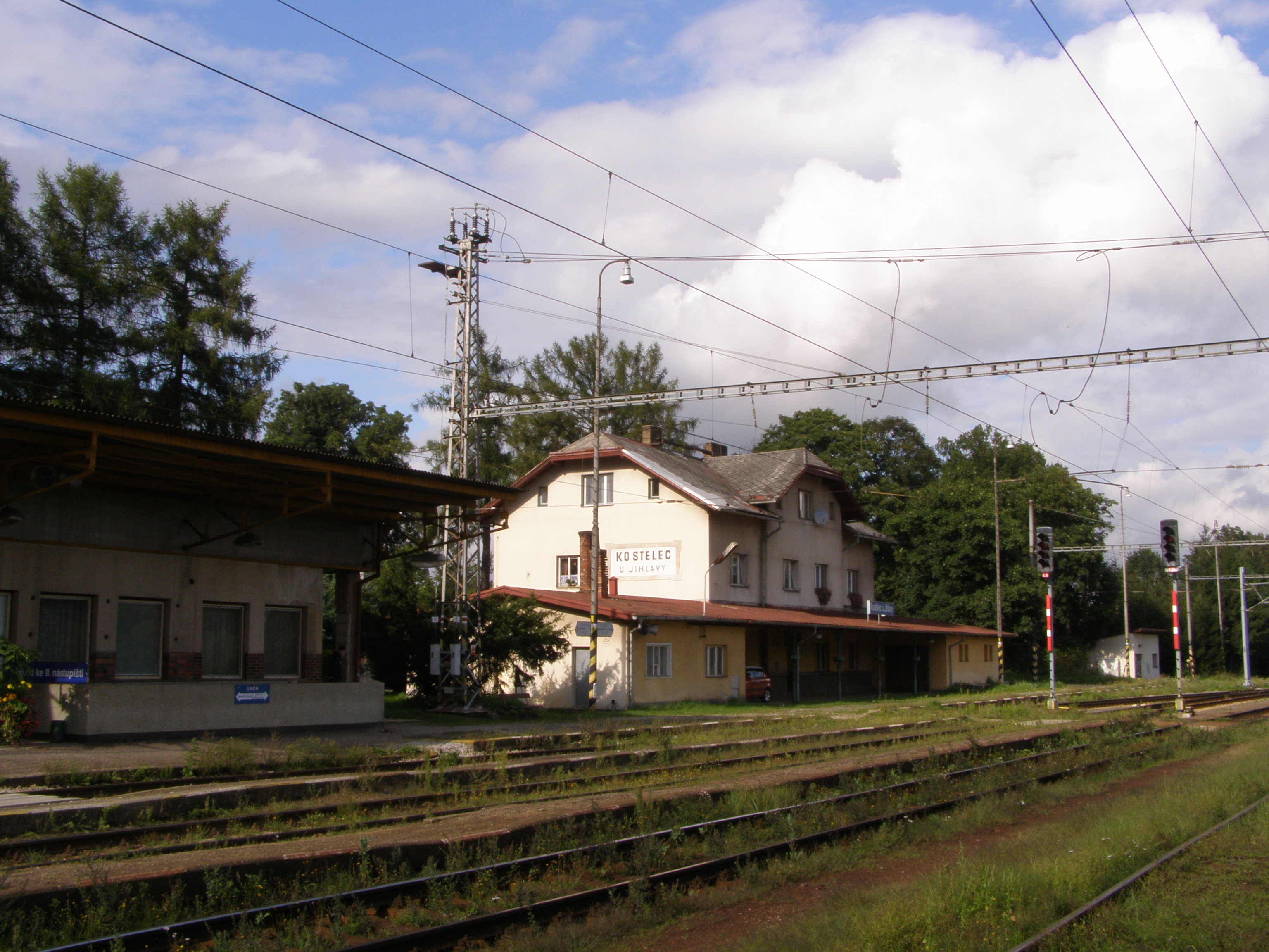 Nádraží Kostelec u Jihlavy v katastru obce Cejle